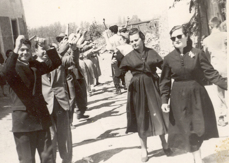 Bailando la jota - Hospital de Órbigo (León) - Fotografía 75 x 60 B/N